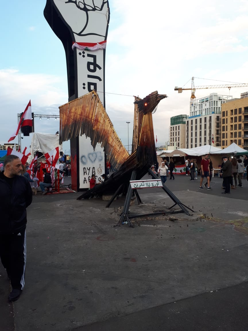 Die Faust der Revolution - Proteste auf dem Beiruter Märtyrerplatz